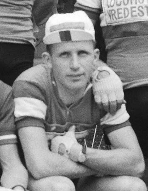 Nationaal Archief Beschrijving: De Nederlandse ploeg, Tour de France 1960 Jaap Kersten Datum: 28 juni 1960 Bestanddeelnummer 911-3748 Vervaardiger: Anefo / Harry Pot (1929–1996) DescriptionDutch photographer and cinematographerDate of birth/death 1929 1996Work location Amsterdam, BentveldAuthority control : Q27877051 VIAF: 284191334 ISNI: 0000 0003 9050 874X Koninklijke: 073478326 creator QS:P170,Q27877051 URL: Voor meer informatie over het Nationaal Archief: Voor meer foto's uit deze en andere collecties, bezoek onze Beeldbank:, U kunt ons helpen onze kennis van de fotocollecties te verrijken door tags en commentaren toe te voegen. Herkent u mensen of locaties of heeft u een bijzonder verhaal te vertellen bij één van de foto's, laat dan een reactie achter (als u ingelogd bent bij Flickr) of stuur een mailtje naar